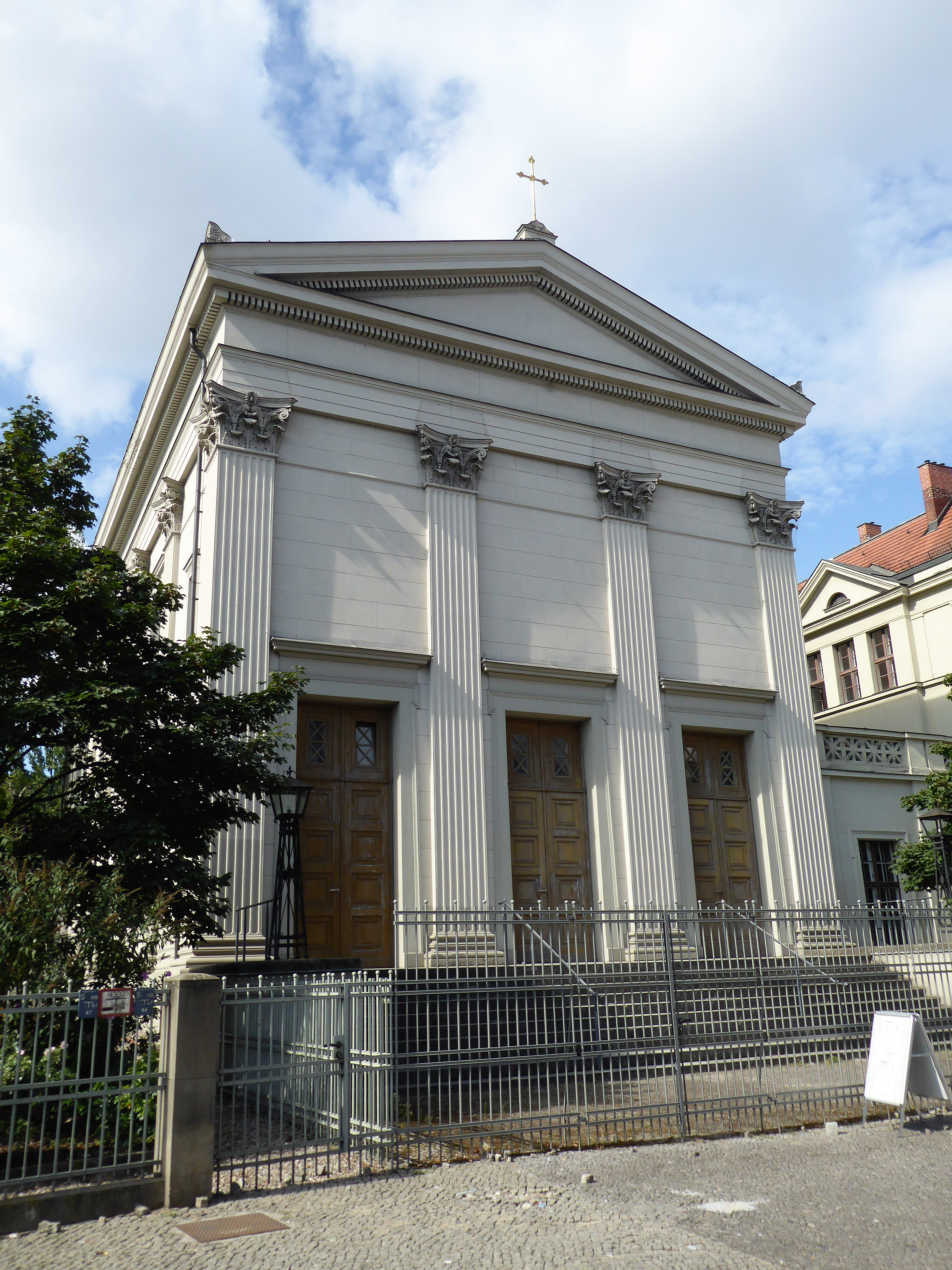 Gesundbrunnen St. Paulskirche Portal